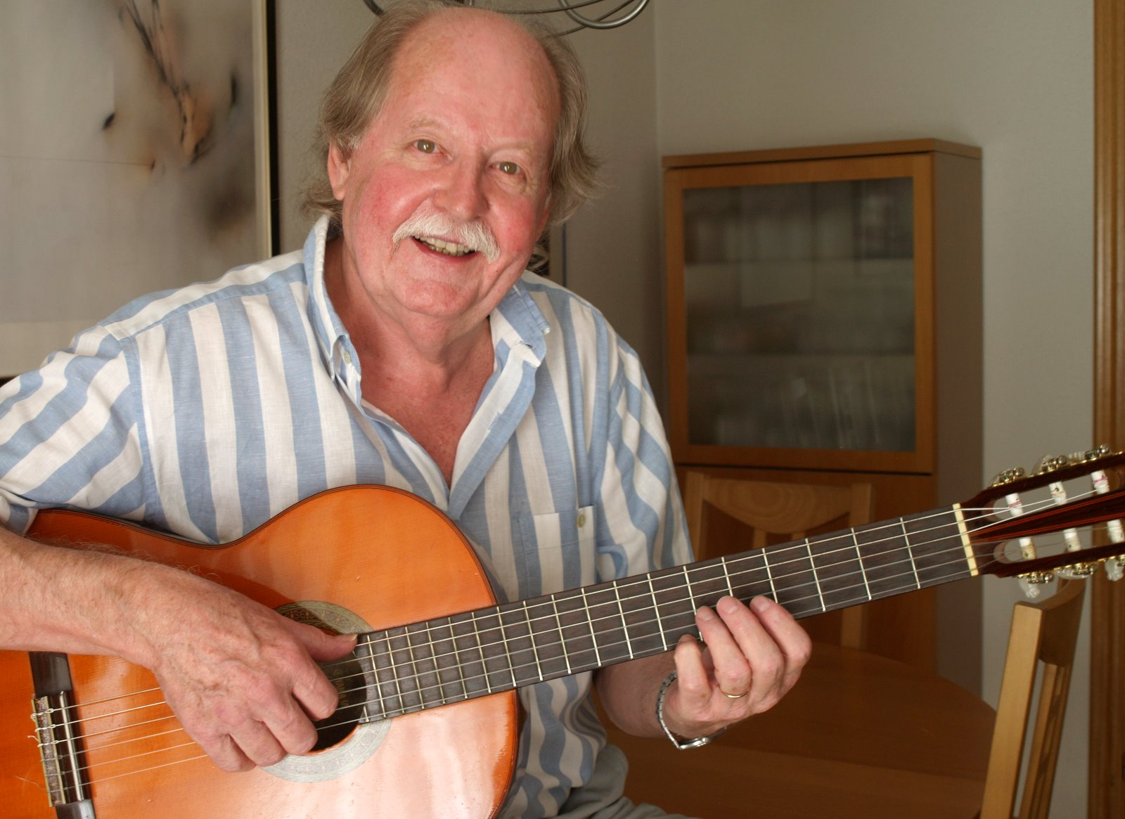 Antoine Candelas con su guitarra